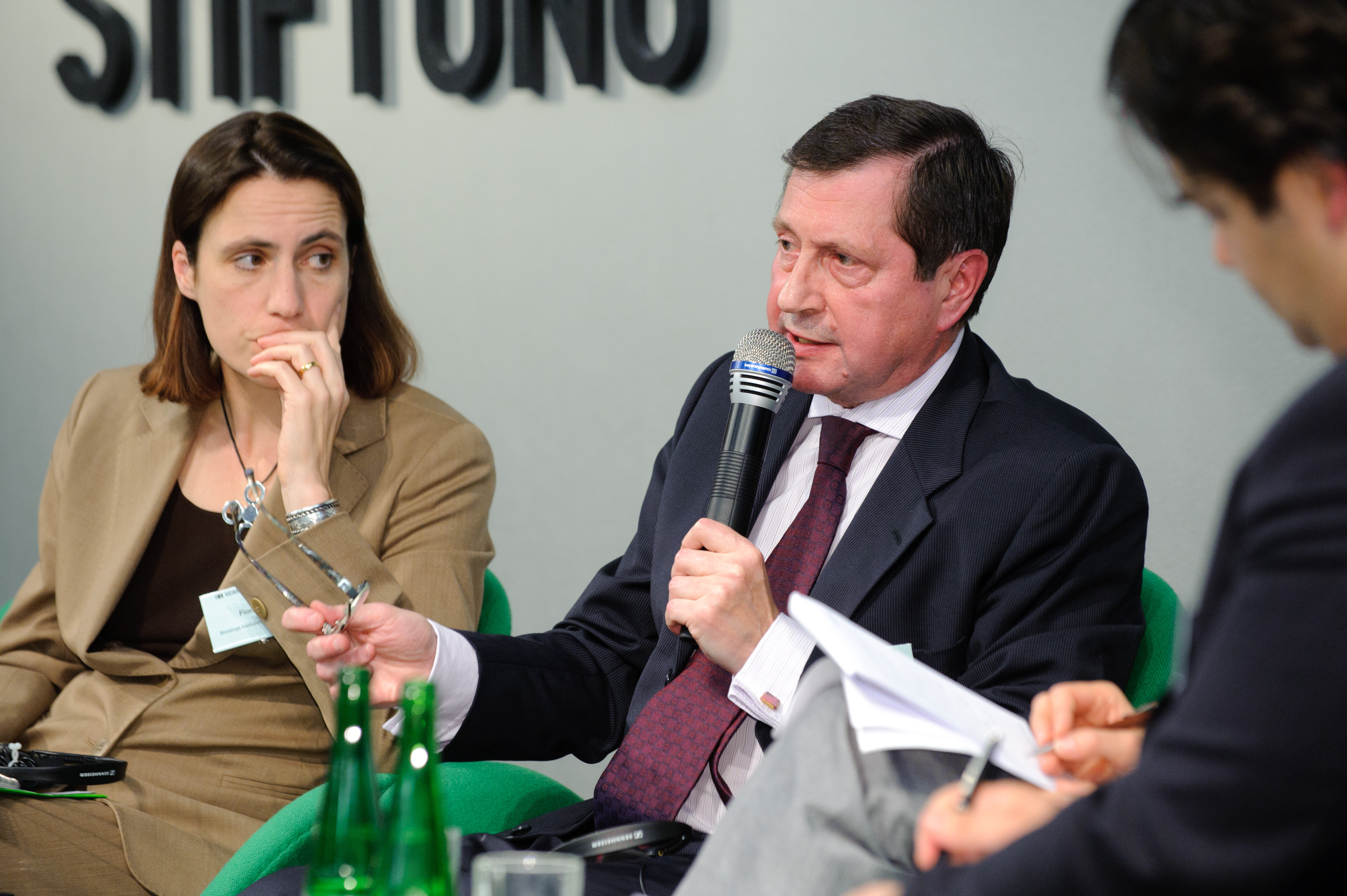 Vladimir M. Grinin (Außerordentlicher und Bevollmächtigter Botschafter der Russischen Föderation in der Bundesrepublik Deutschland, Berlin) Foto: CC-BY-SA Stephan Röhl /